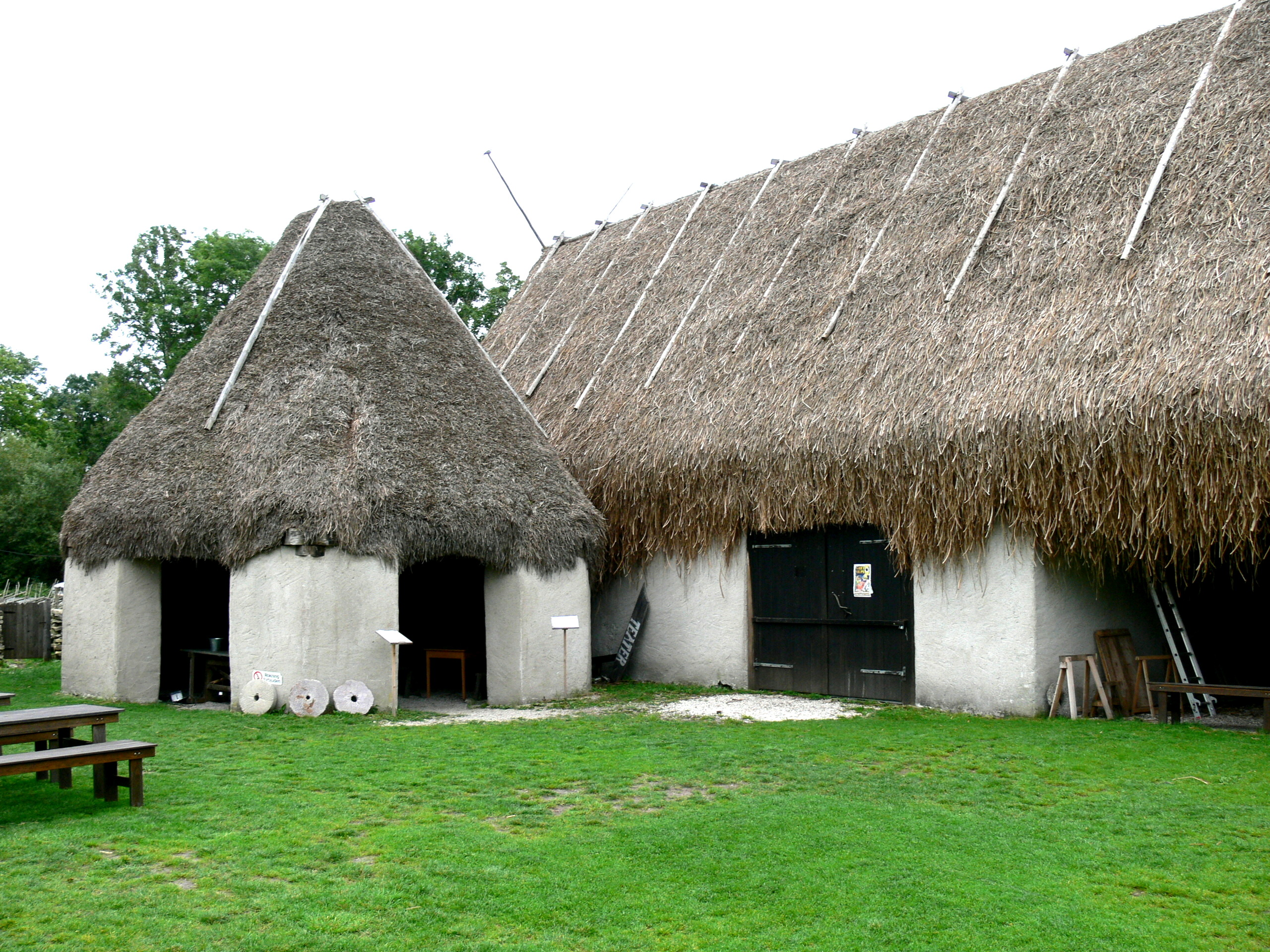 Bottarve Museum auf Gotland. Stall mit einem Dach aus Schneidried